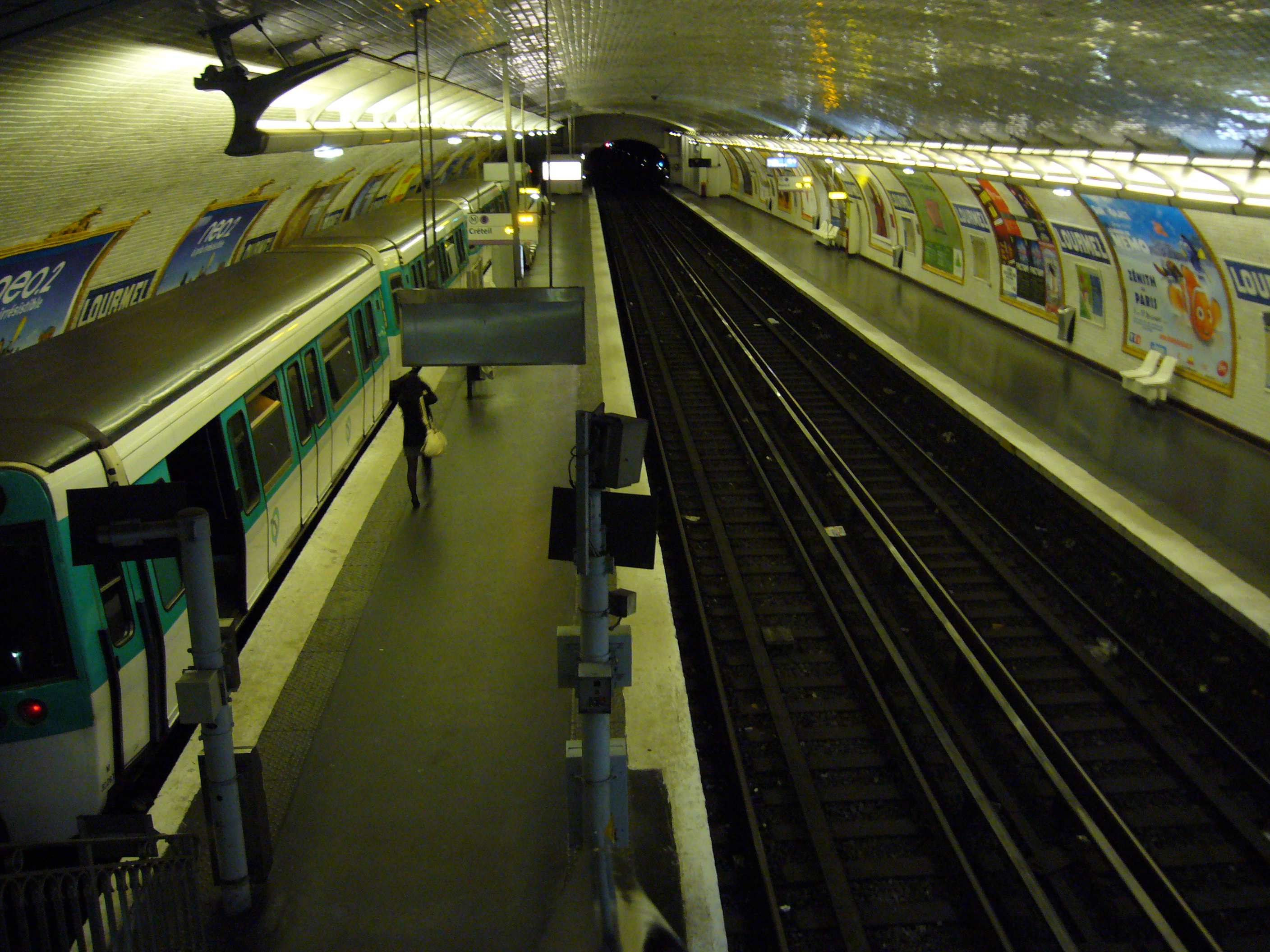 Vue des quais de la station Lourmel sur la ligne 8 du métro de Paris.